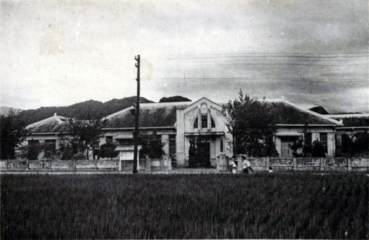 中文（台灣）: 新高郡役所